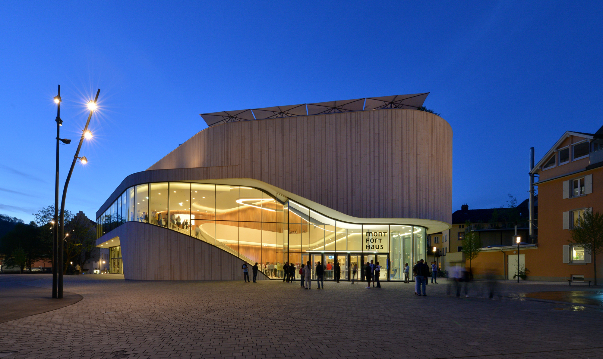 Das Kultur Kongresszentrum Montforthaus [1] in Feldkirch wurde nach Plänen von Hascher Jehle Architektur 2014 fertiggestellt und am 2. Januar 2015 feierlich eröffnet.